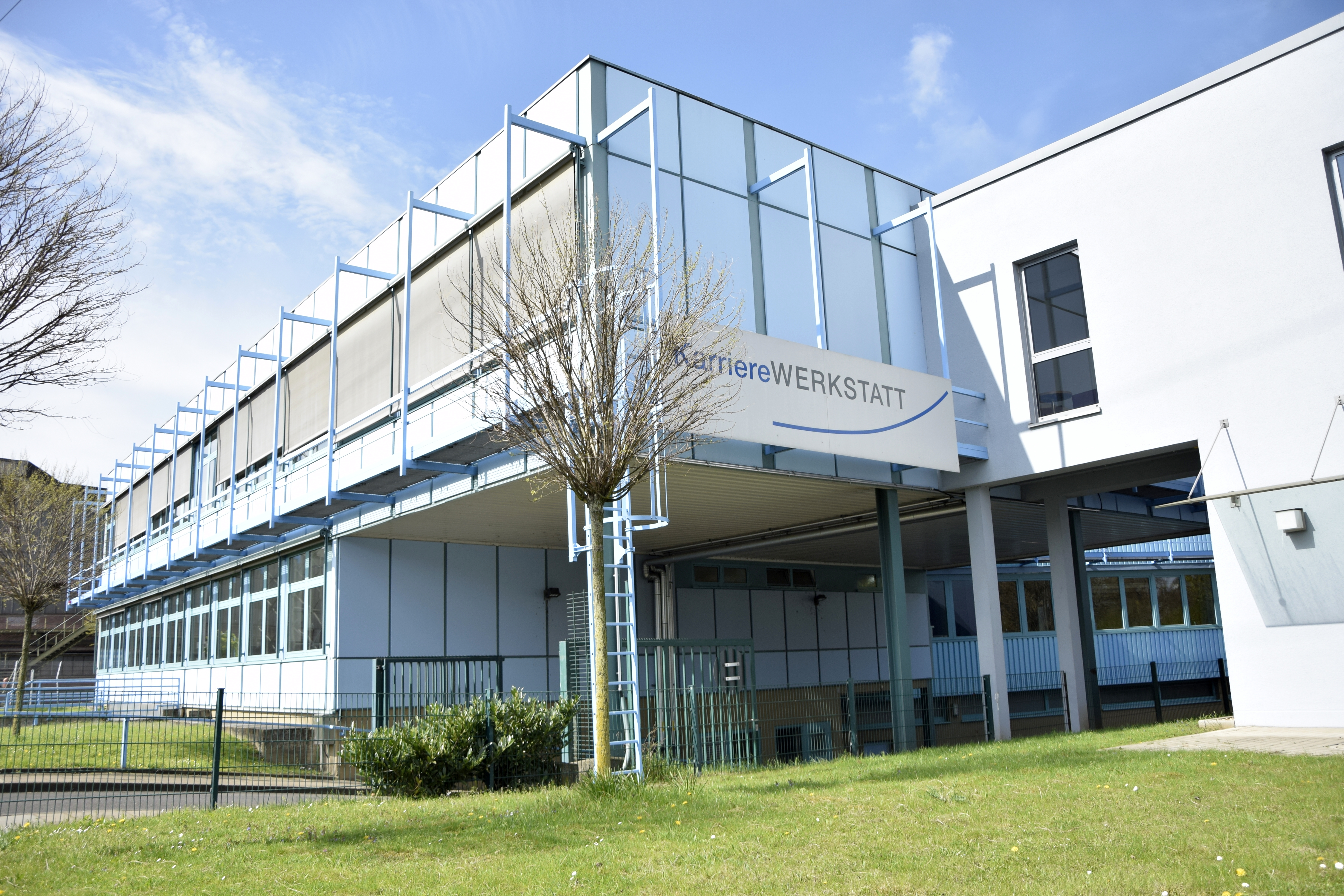 Die Außenansicht der KarriereWERKSTATT in Witten